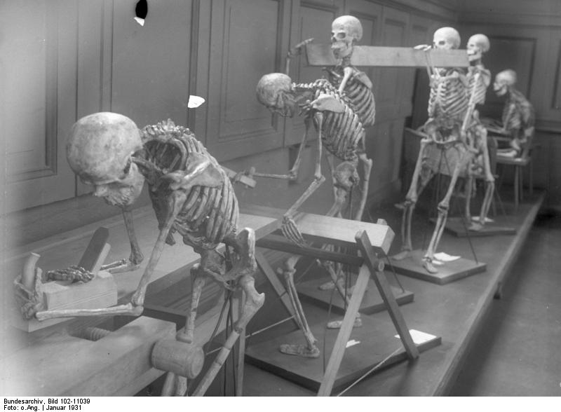 Die Körperhaltung bei der Arbeit! Die Erkenntnis, dass die richtige Körperhaltung bei der Arbeit eine wichtige Rolle spielt, hat zu einer einzigartigen Ausstellung im Arbeiterschutz-Museum in Berlin geführt. Da durch die Not die deutsche Wirtschaft immer mehr rationalisiert wird, setzt man alles daran, die Körperhaltung bei der Arbeit den Forderungen der Neuzeit anzupassen. Richtige und falsche Körperhaltung im Beruf, dargestellt von menschlichen Skeletten.